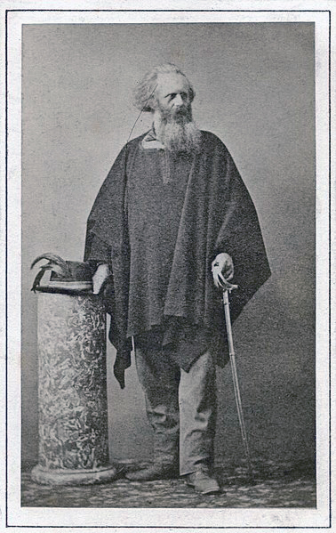 Photograph by Henry Hering